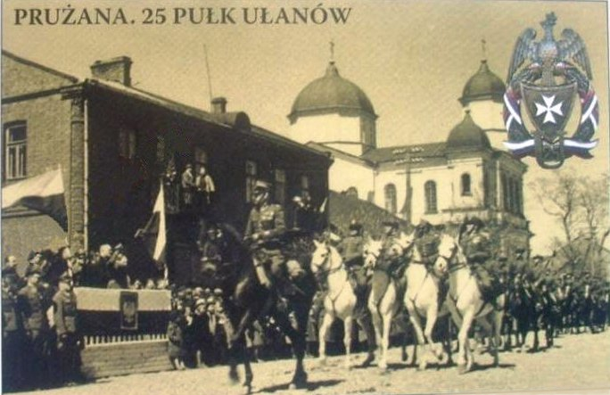 Беларуская (тарашкевіца): 25-ы полк вялікапольскіх уланаў на парадзе ў гонар дня Канстытуцыі